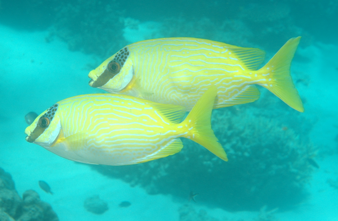 Siganus puellus